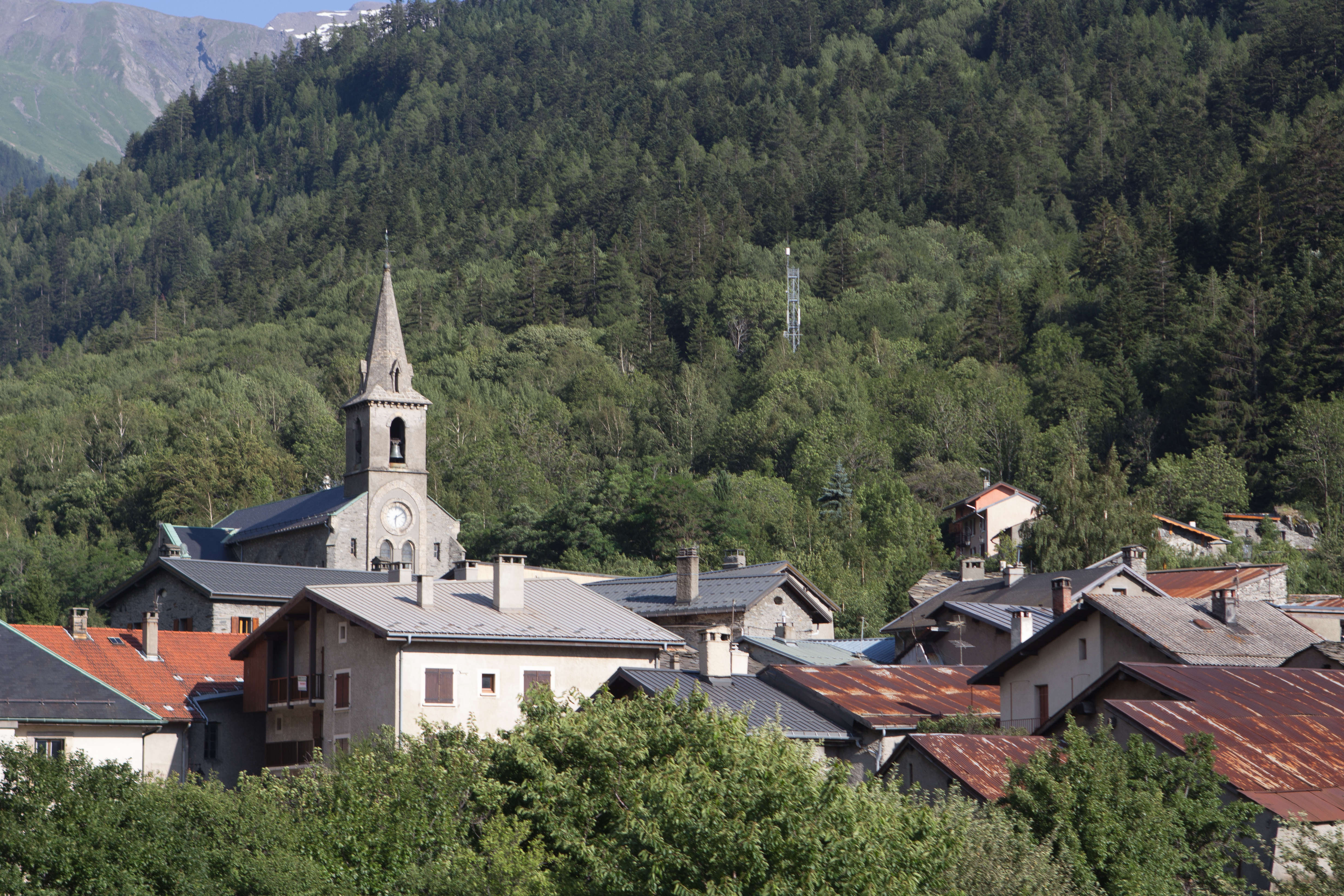 Vue du village du Freney commune du Freney, Savoie, France